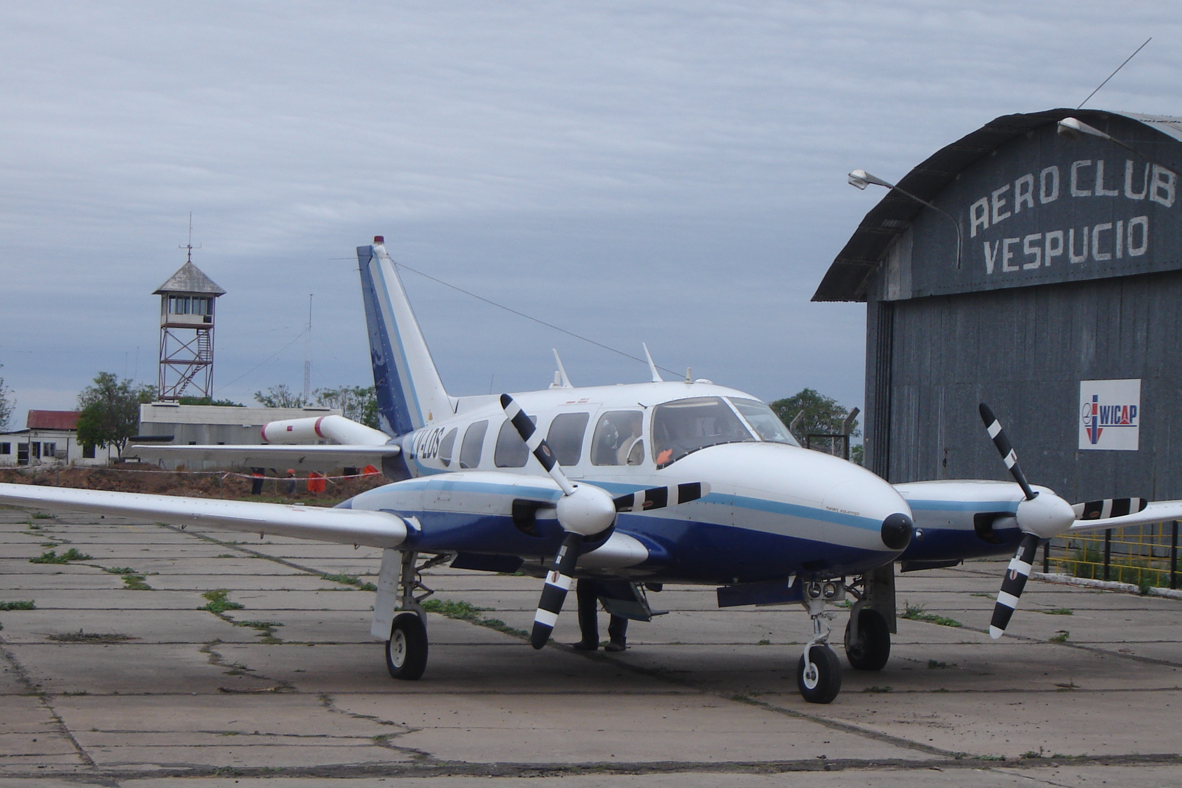 Piper Navajo en plataforma.